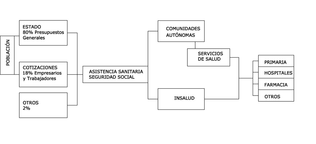 Esquema de creación de presupuesto de Sanidad Español